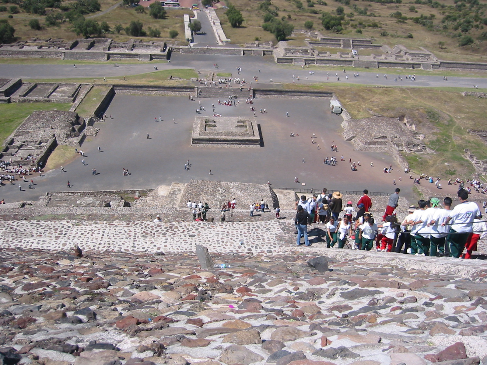 منظر من أعلى هرم من أهرامات الآزتك.